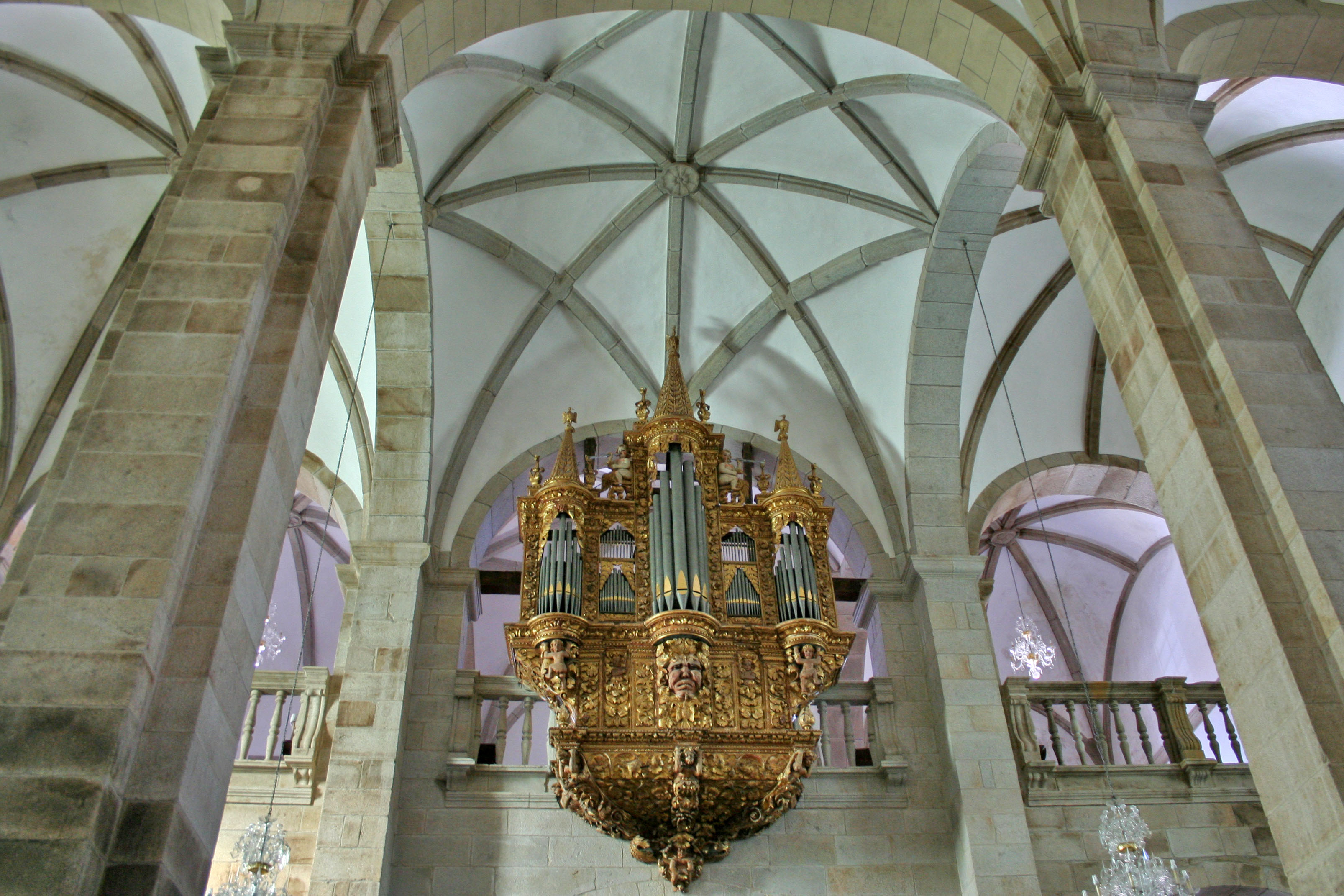 Orgão da Igreja de Miranda do Douro ou Antiga Sé de Miranda do Douro This monument is classified as Monumento Nacional. This file was uploaded for Wiki Loves Monuments in Portugal with the unique identifier 70282.